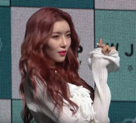 1월 8일 오후 서울 광진구 예스24 라이브홀에서 ‘우주소녀(WJSN)’ 새 미니앨범 ‘WJ STAY' 발매 기념 '미디어 쇼케이스가 열렸다.